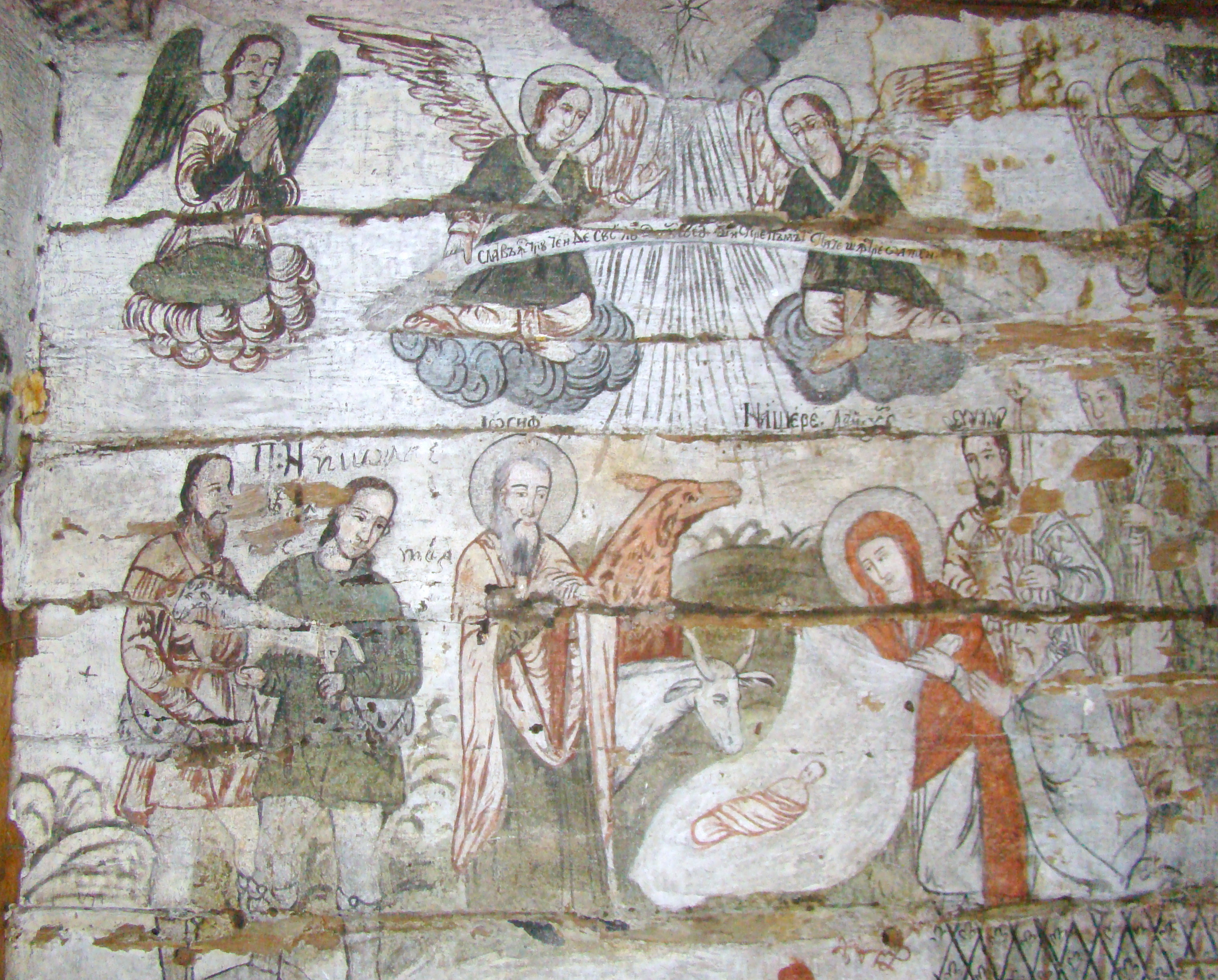 Biserica de lemn din Racâș, județul Sălaj